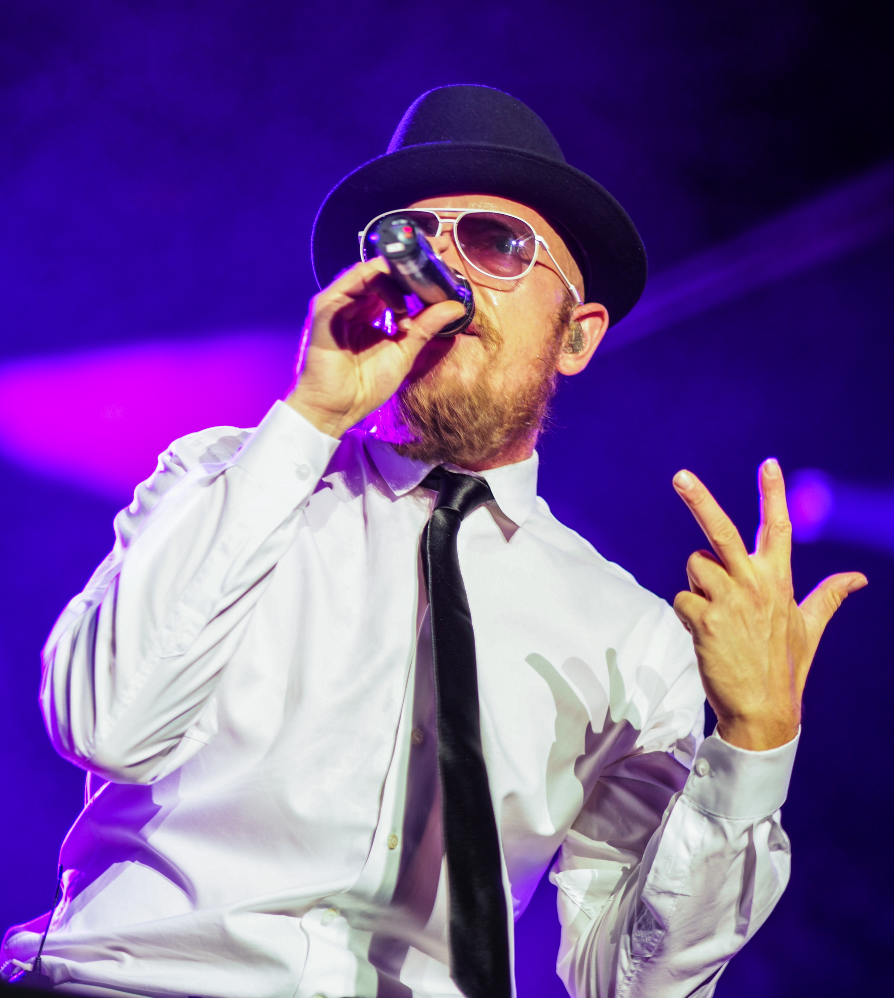 Jan Delay Energy in the Park 2013